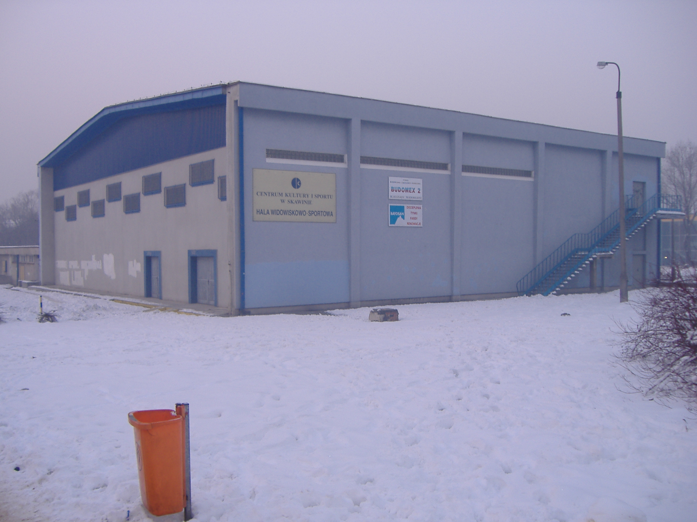 Skawina-hala sportowa